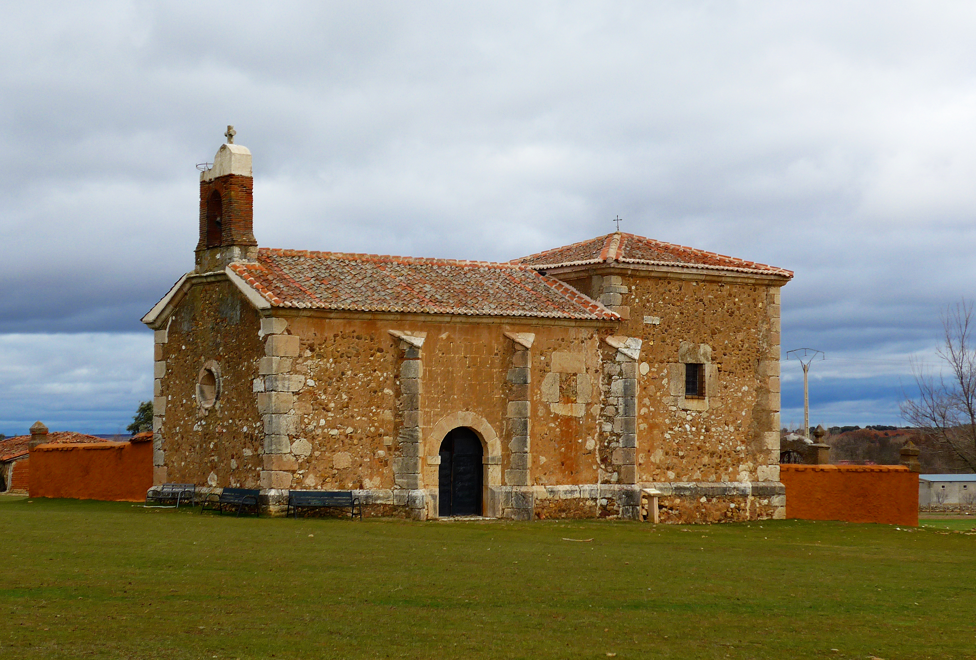 Ermita de Santa María Magdalena, construida en el siglo XVI, se encuentra en las afueras de Saldaña de Ayllón. Provincia de Segovia. España.